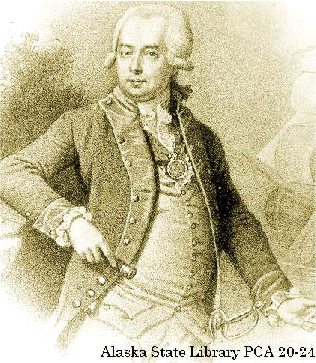 Bild von Grigori Iwanowitsch Schelikow